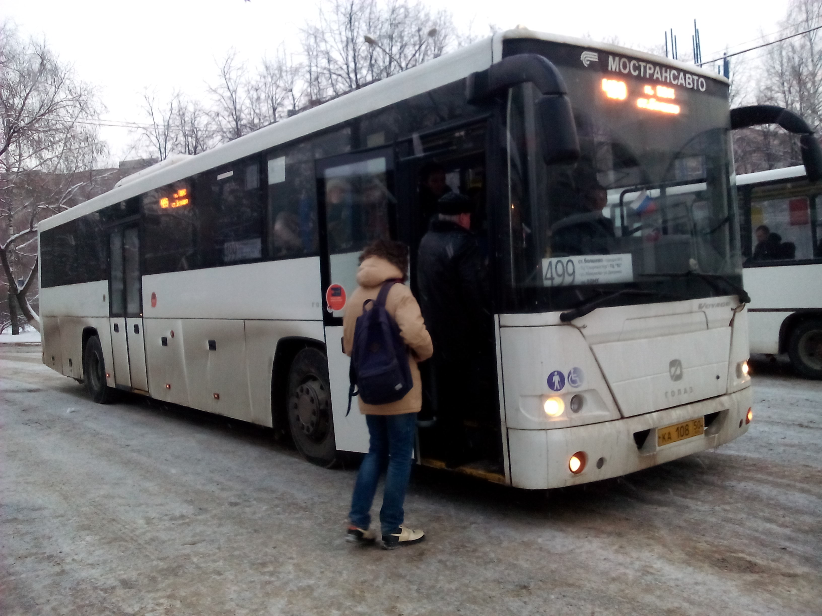 Автобус 499 на ост. Городок 3